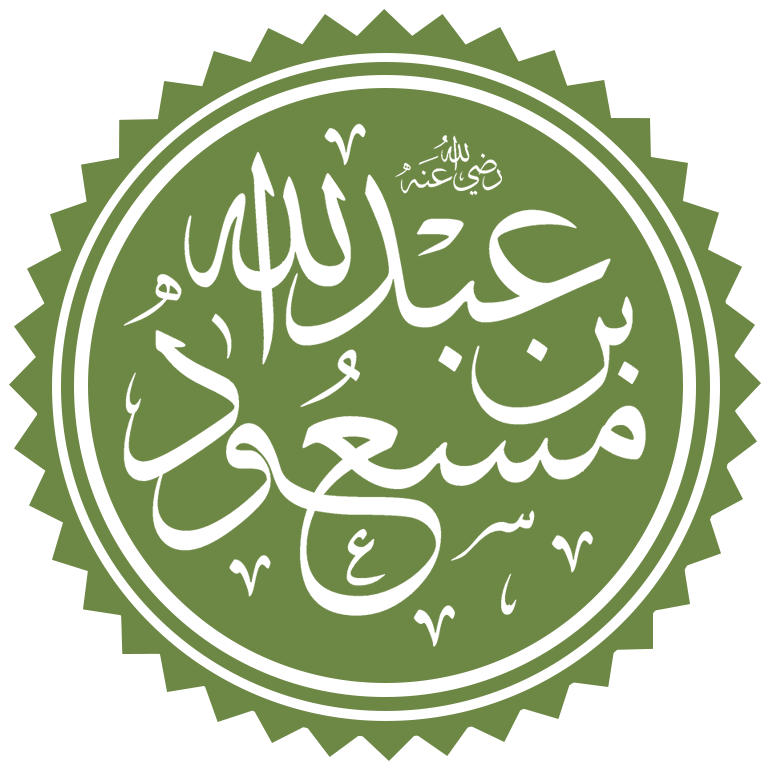 اسم الصحابي الجليل عبد الله بن مسعود رضي الله عنه